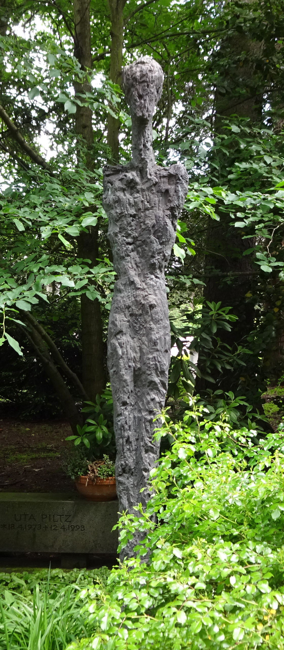 Figur von Michael Irmer auf der Grabstätte Piltz-Rumler, 1993